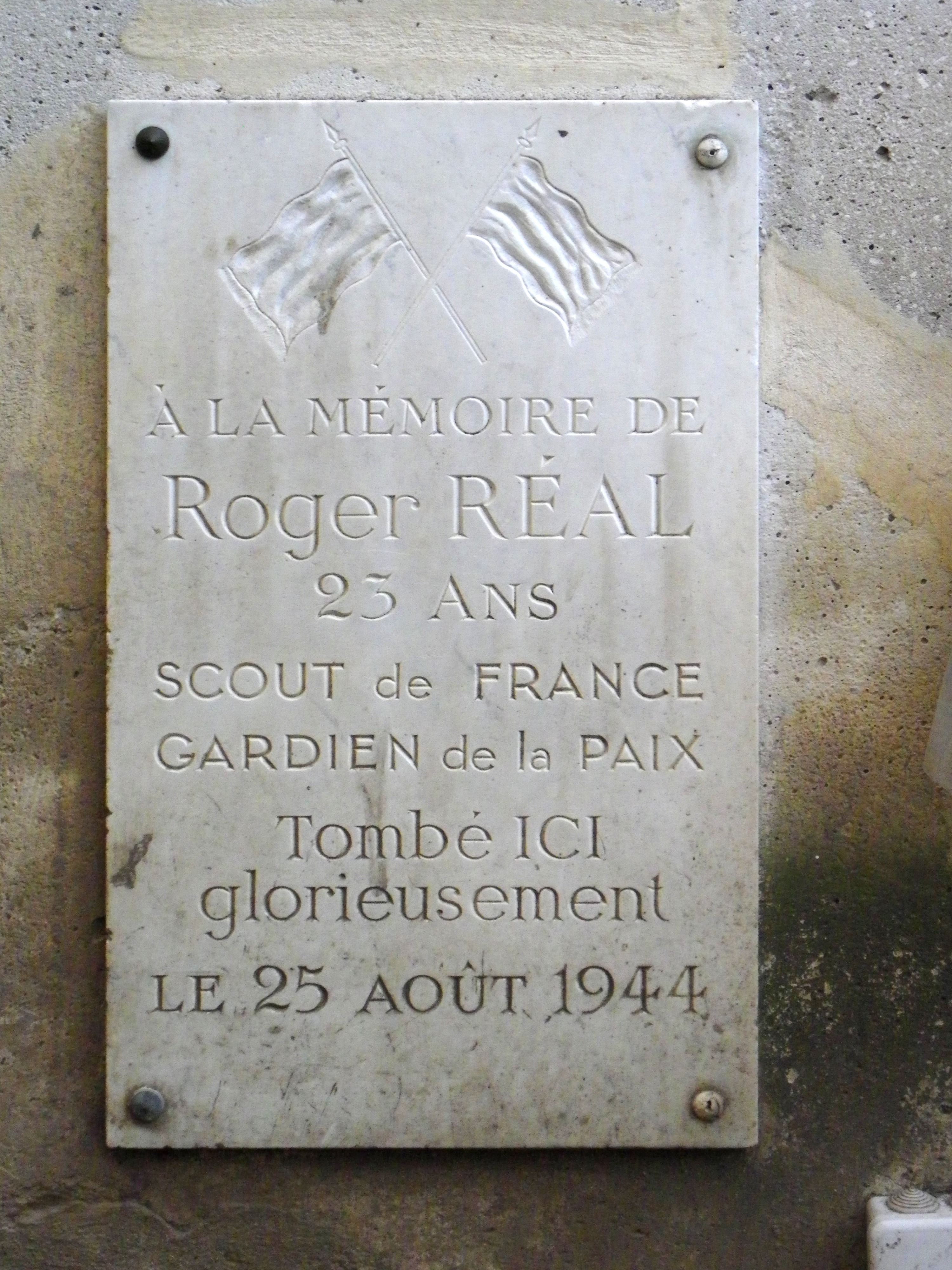 Plaque Roger Réal - Espace Pierre Cardin à Paris